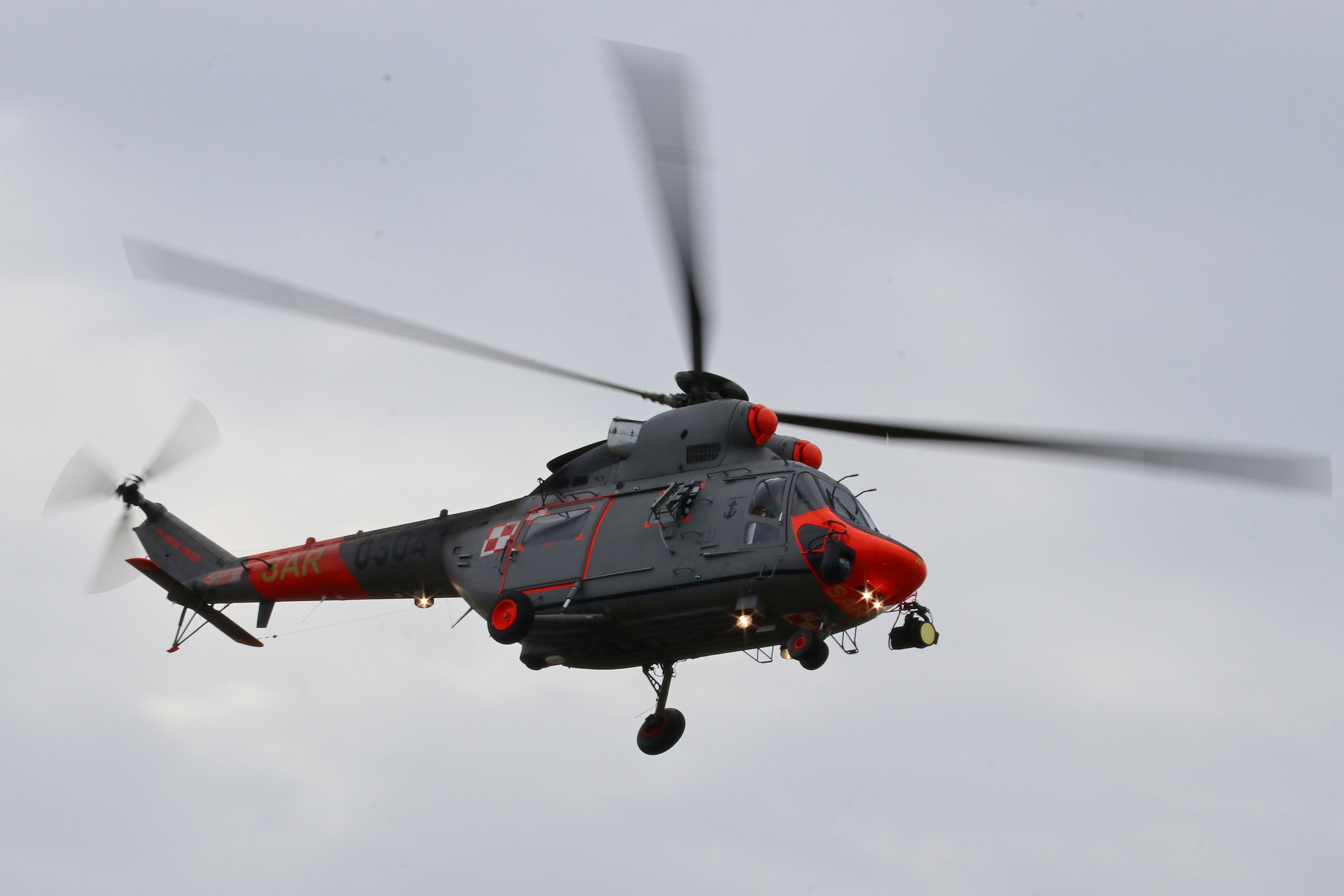 Śmigłowiec ratownictwa morskiego W-3WARM Anakonda